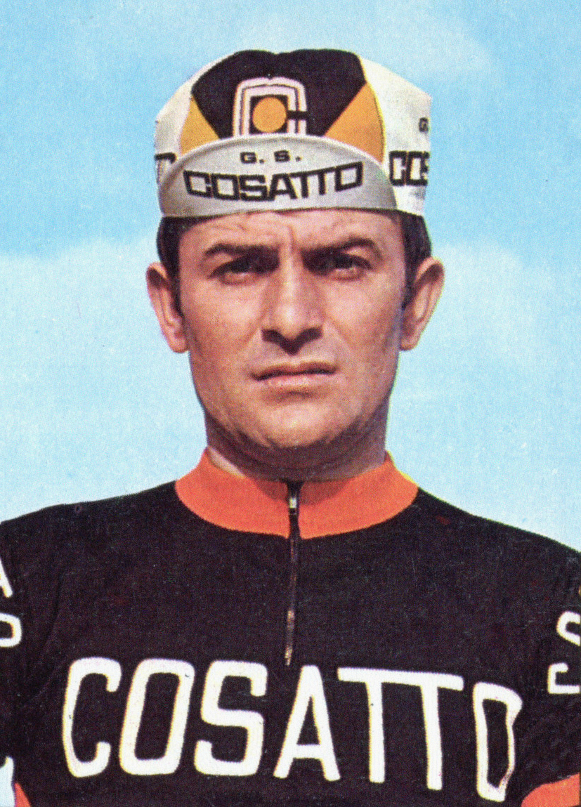 SPRINT '71 - PANINI - Figurina-Sticker n. 125 - W. PANIZZA - ITALIA - Rec